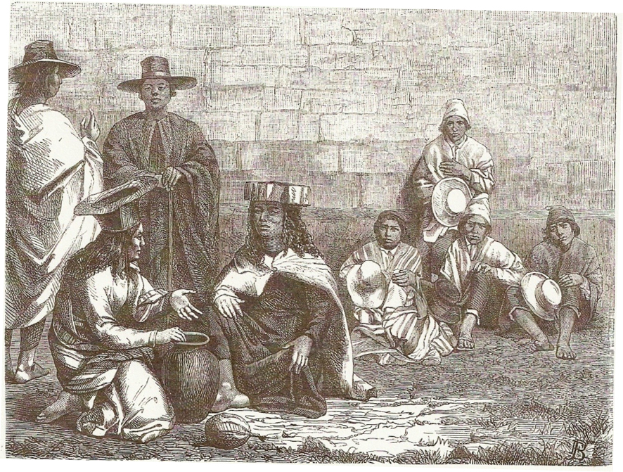 Indios atacameños y aymaras. Dibujo de Bassot según una fotografía.